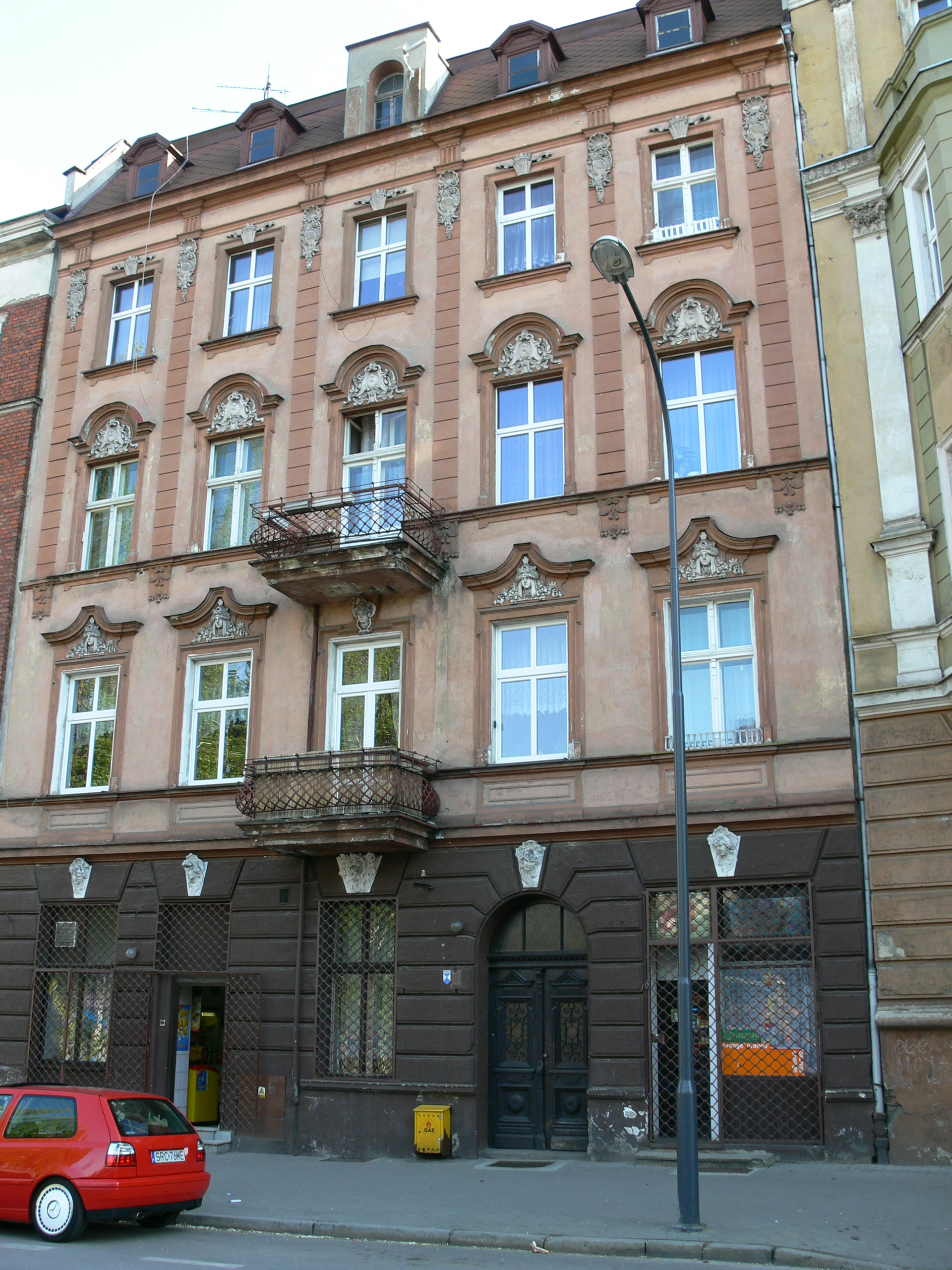 Racibórz - kamienica przy ul. Staszica 21